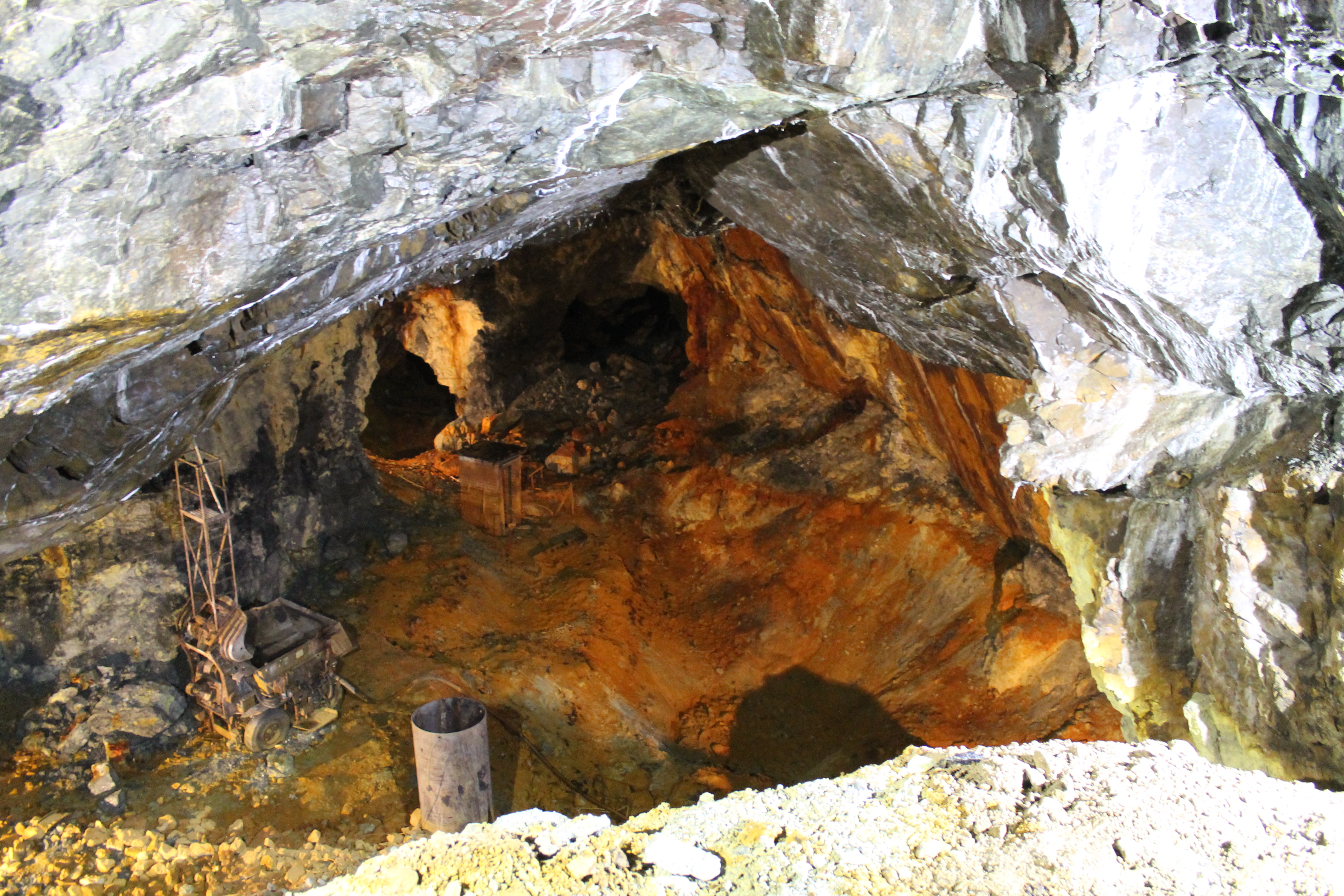 Weitung 1